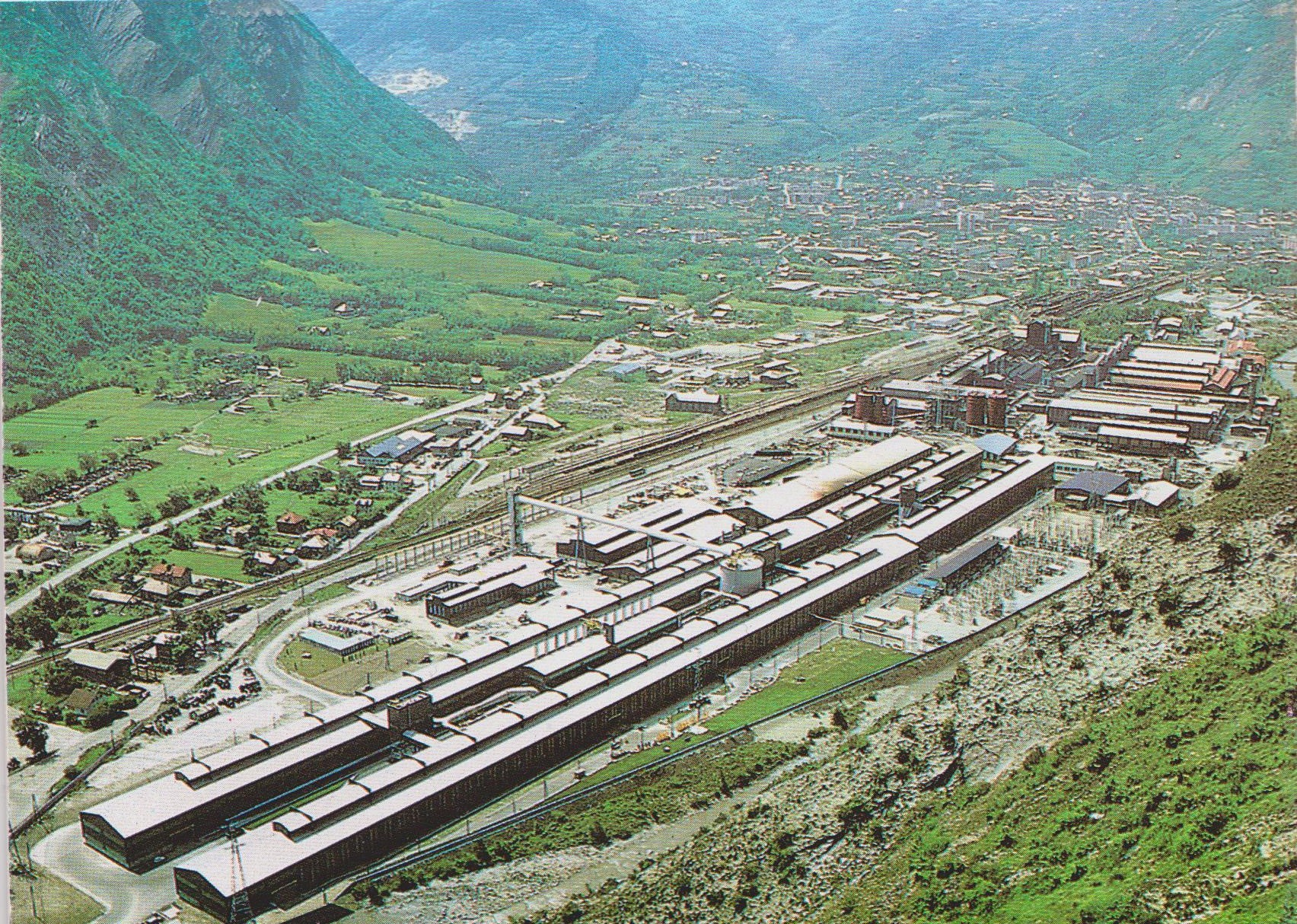 Photographie de l'usine d'aluminium de Trimet à Saint-Jean-de-Maurienne.